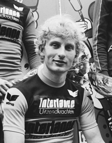 Olympias ronde door Nederland, laatste etappe; eindwinnaar Oleg Logvin